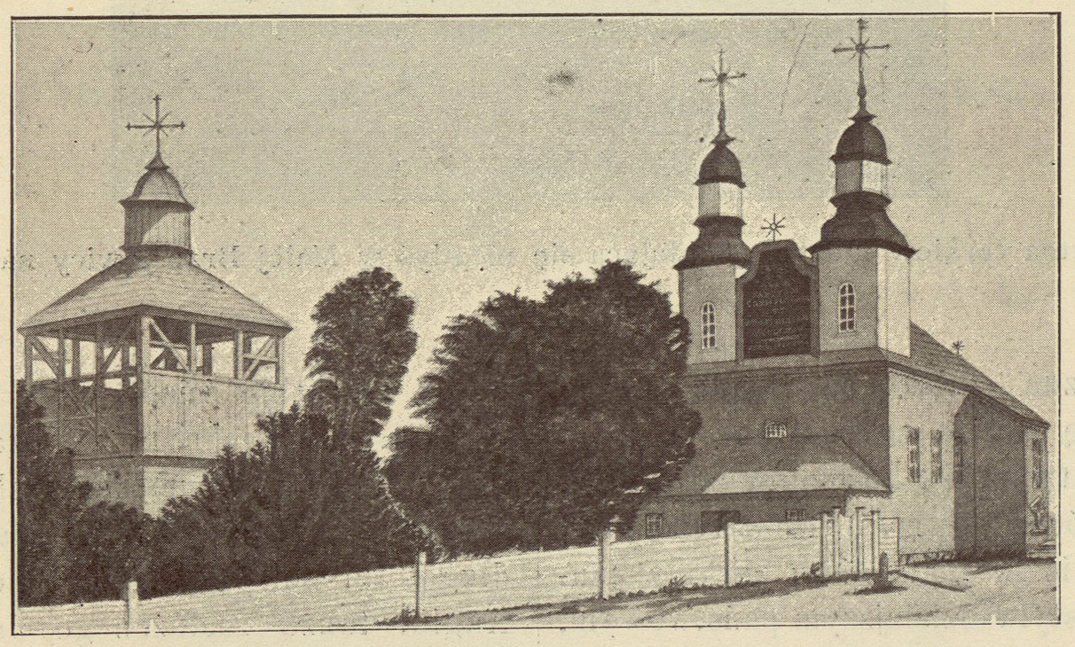 Беларуская (тарашкевіца): Слуцак (Słucak), вуліца Фарская (vulica Farskaja). Фарны касьцёл